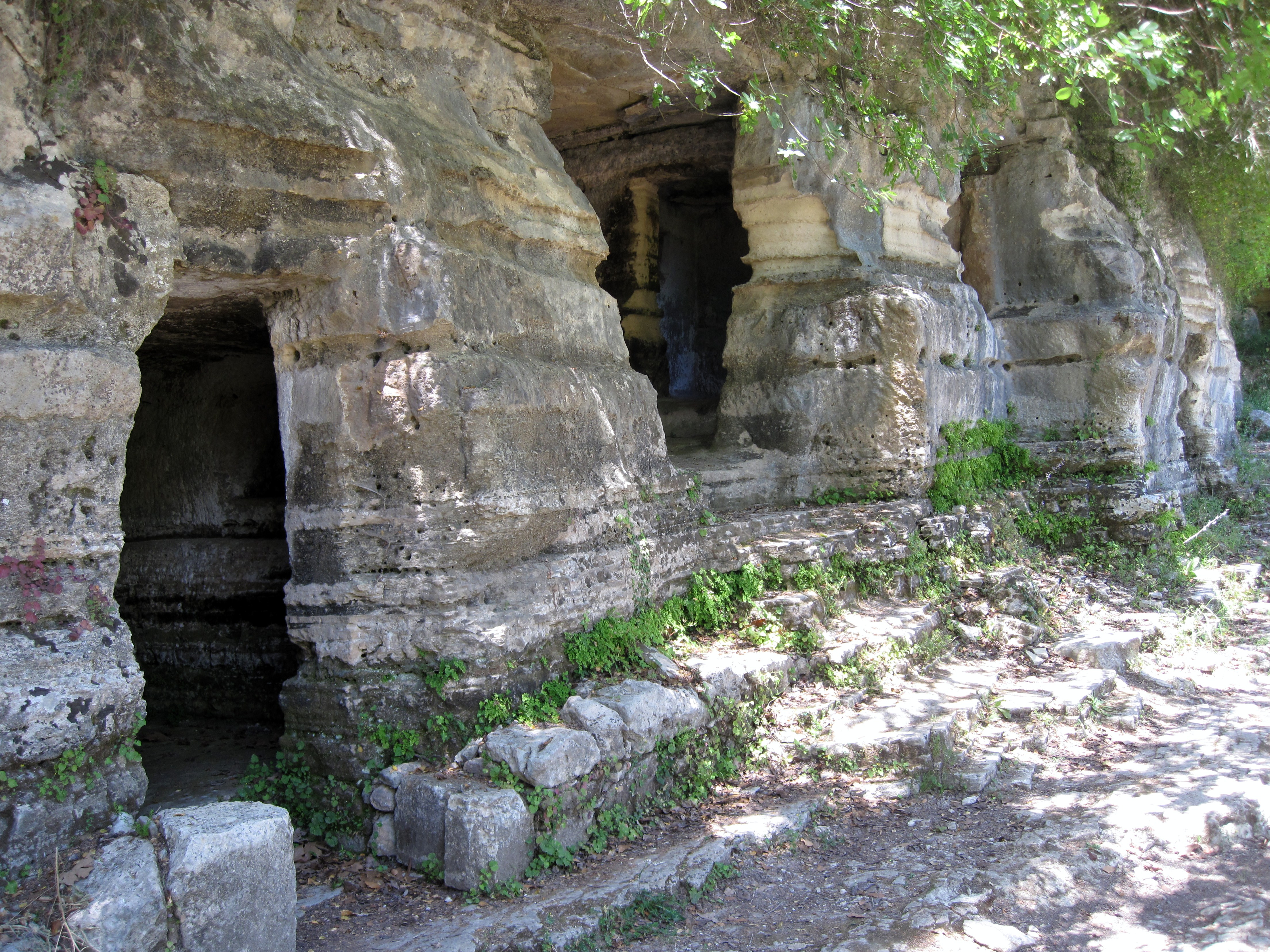 Nekropole der antiken Stadt Lappa bei Argyroupoli, Gemeinde Rethymno, Regionalbezirk Rethymno, Kreta, Griechenland